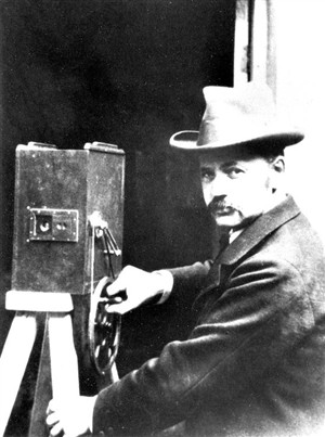 James Williamson (1855–1933) Filmpionier, Großbritannien